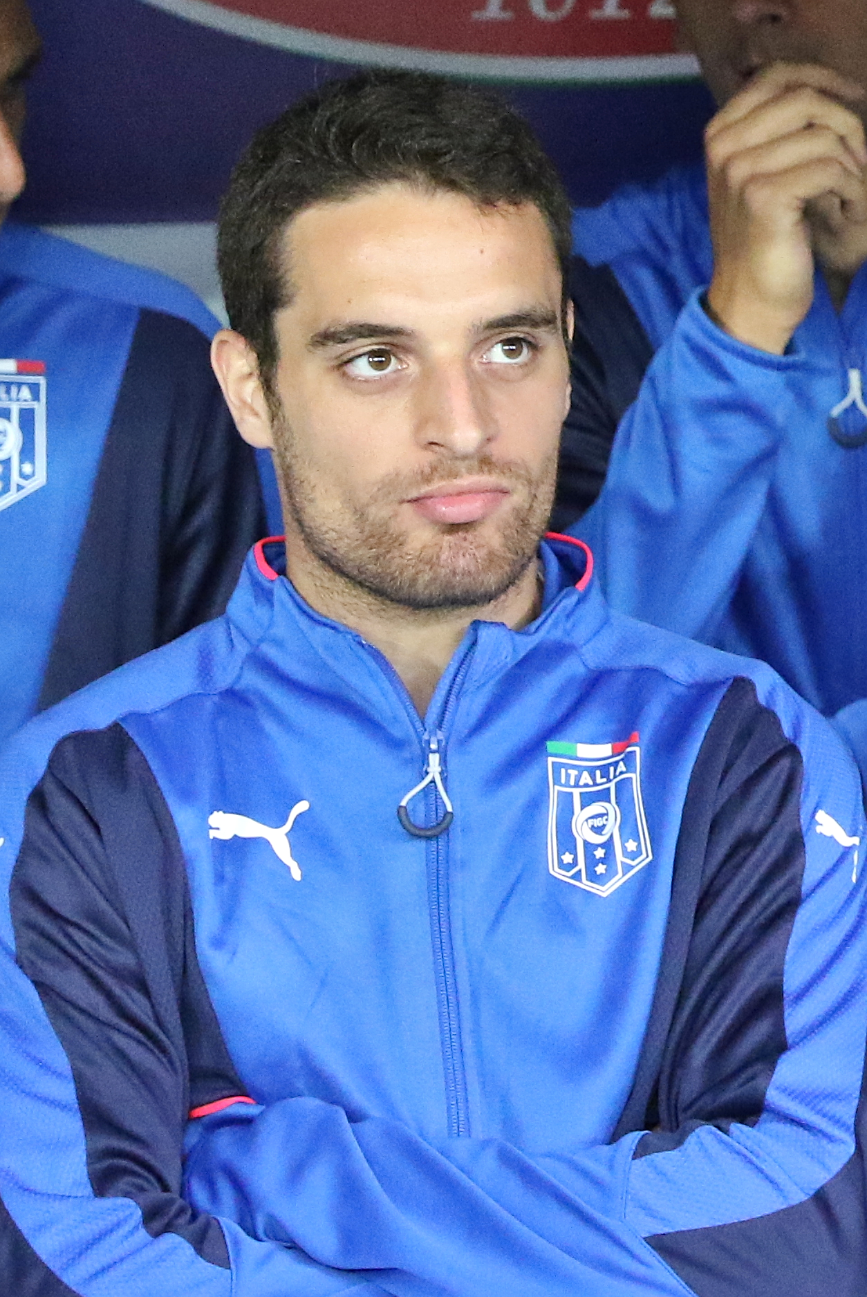 20150616 - Portugal - Italie - Genève - Giacomo Bonaventura